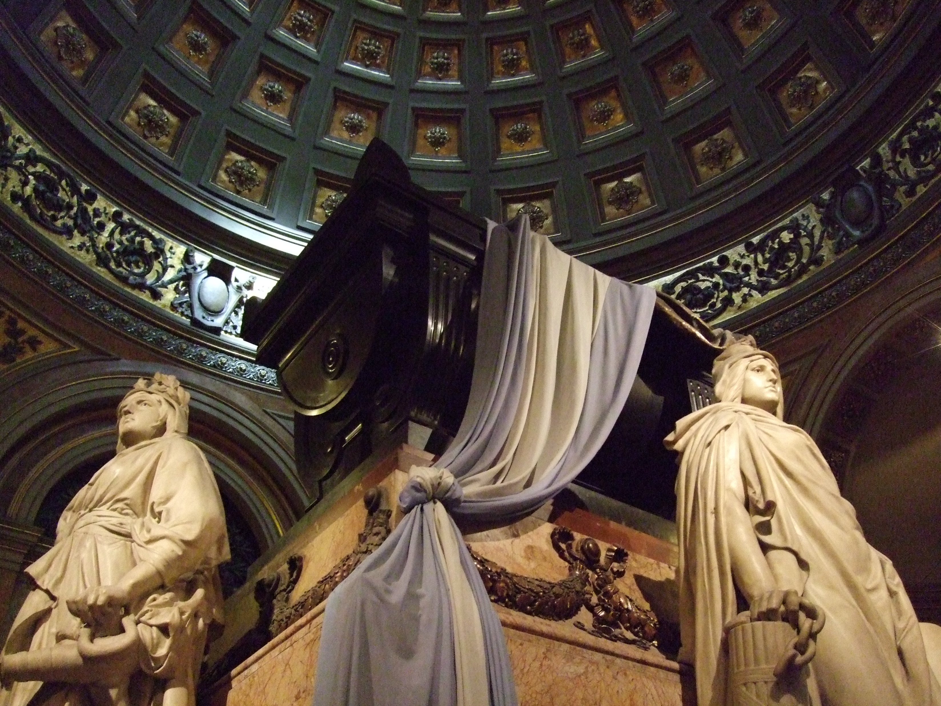 Mausoleo del general San Martín en la catedral metropolitana de Buenos Aires.